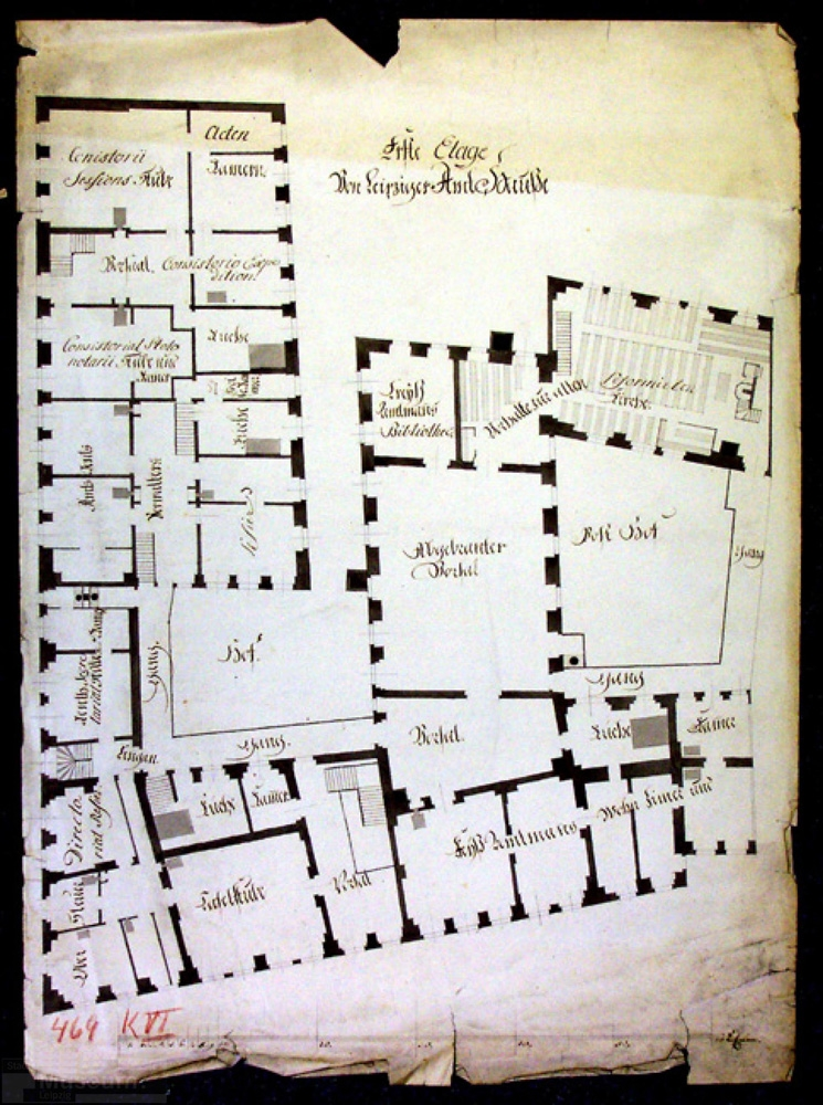 Plan vom Leipziger Amt Hauße. Erste Etage.Grundrisszeichnung von 1778